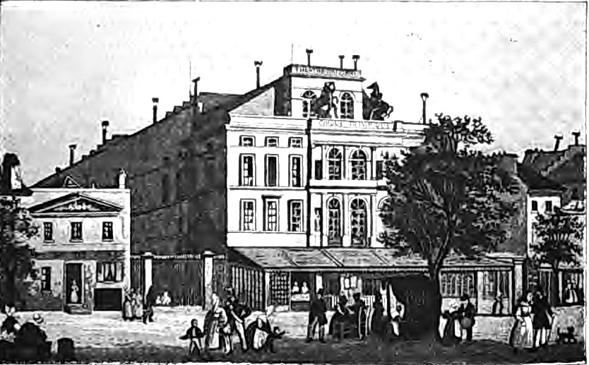 Cirque Olympique, gravé par H. Berteroud, d'après A. Testard. Ce cirque, construit à partir de 1826 et inauguré en 1827 sur le côté pair du Boulevard du Temple à Paris, remplaça le précédent Cirque Olympique, ouvert en 1877 rue du Faubourg-du-Temple et détruit par un incendie en 1826. Le bâtiment changea plusieurs fois de propriétaire et de nom (Théâtre Lyrique en 1847, Théâtre National ou Opéra National en 1851, Théâtre Lyrique à nouveau à partir de 1852, Théâtre Impérial sous le premier Empire), avant de fermer en 1862. Il a été démoli peu de temps après cette date.